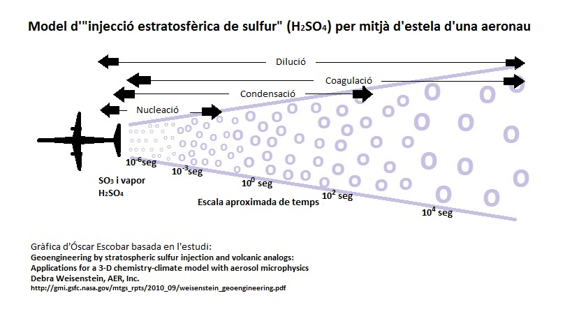 Gràfica d'Óscar Escobar basada en l'estudi: Geoengineering by stratospheric sulfur injection and volcanic analogs: Applications for a 3-D chemistry-climate model with aerosol microphysics Debra Weisenstein, AER, Inc.